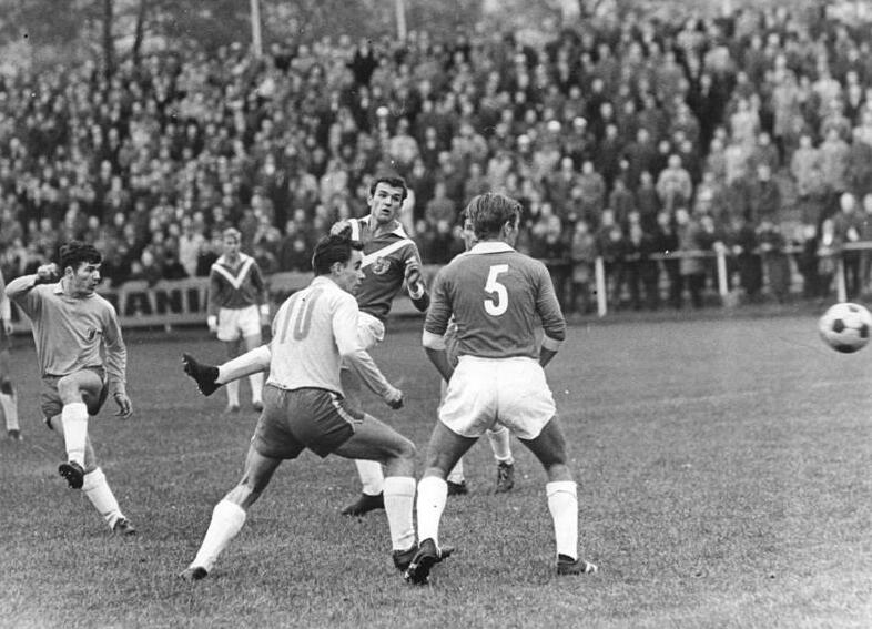 Zentralbild-Koch Ma-At. 3.11.1965 Leipzig: Fußball-Oberliga - SC Leipzig - SC Empor Rostock 0:4 - Wolfram Löwe (SC Leipzig, links) schießt auf das Rostocker Tor. Weiter v.l.n.r.: Frenzel (Leipzig, Nr. 10), Sykora und Pankau (Nr. 5, beide Rostock). Information: Im Leipziger Zentralstadion unterlag im Oberliga-Punktspiel am 3.11.1965 der SC Leipzig dem SC Empor Rostock mit 0:4 Toren.